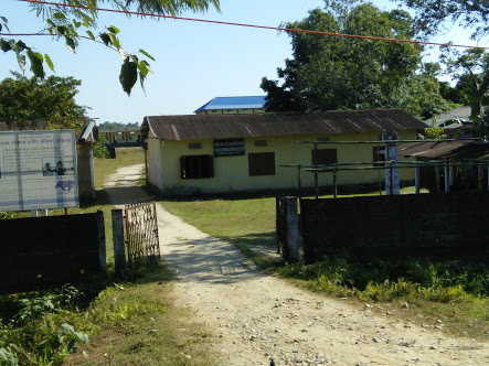 Sissiborgaon